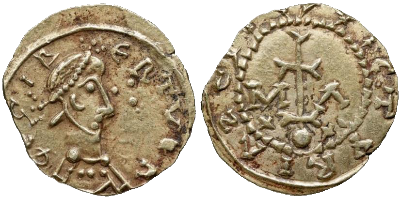 Sou d'or de Sigebert II frappé à Marseille (639-650). BNF, monnaies, médailles et antiques. Avers : Buste diadémé à droite. Revers : Croix sur un degré posé sur un globe, accostée de M-A et X-X.